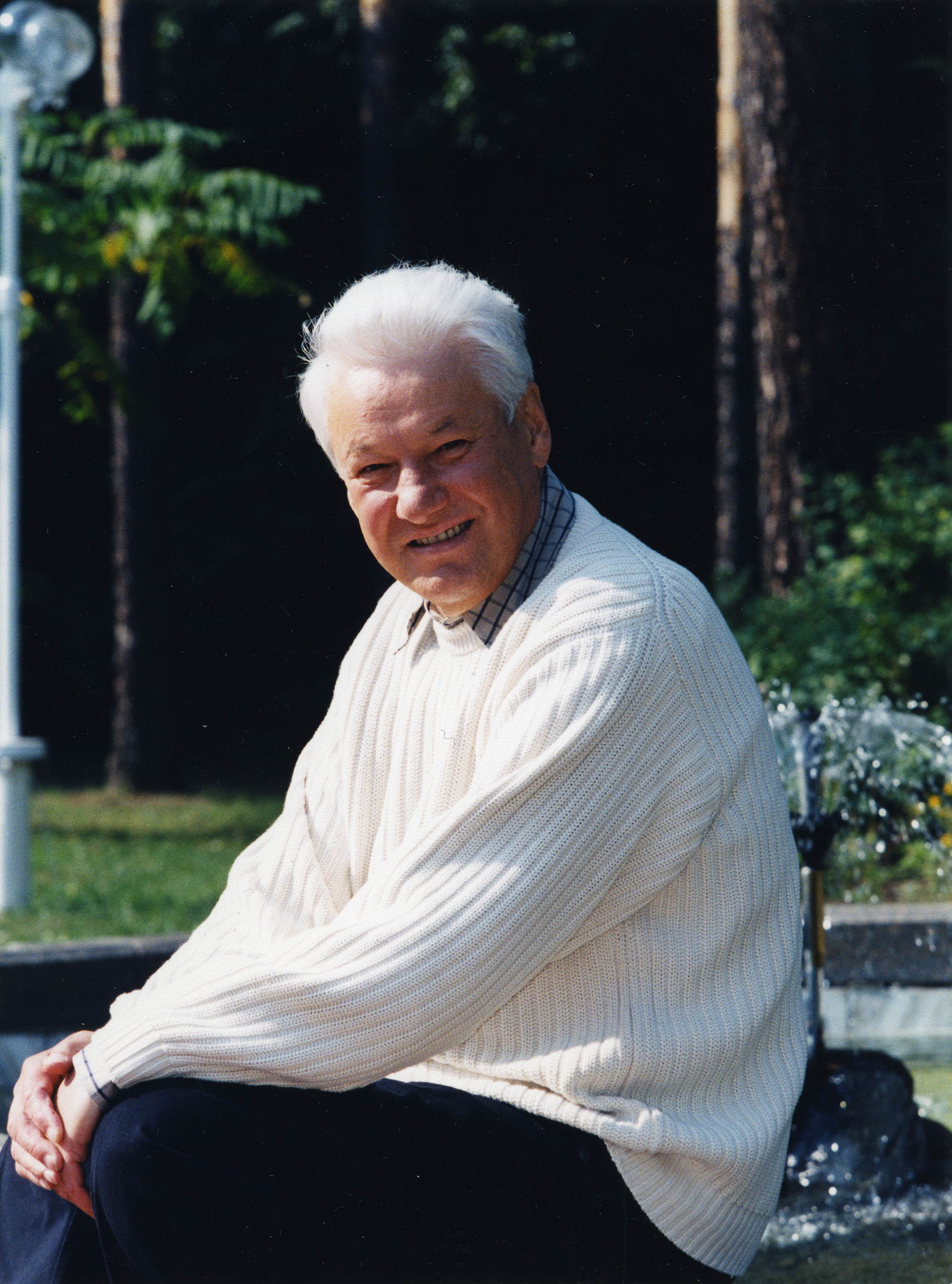 Boris Yeltsin